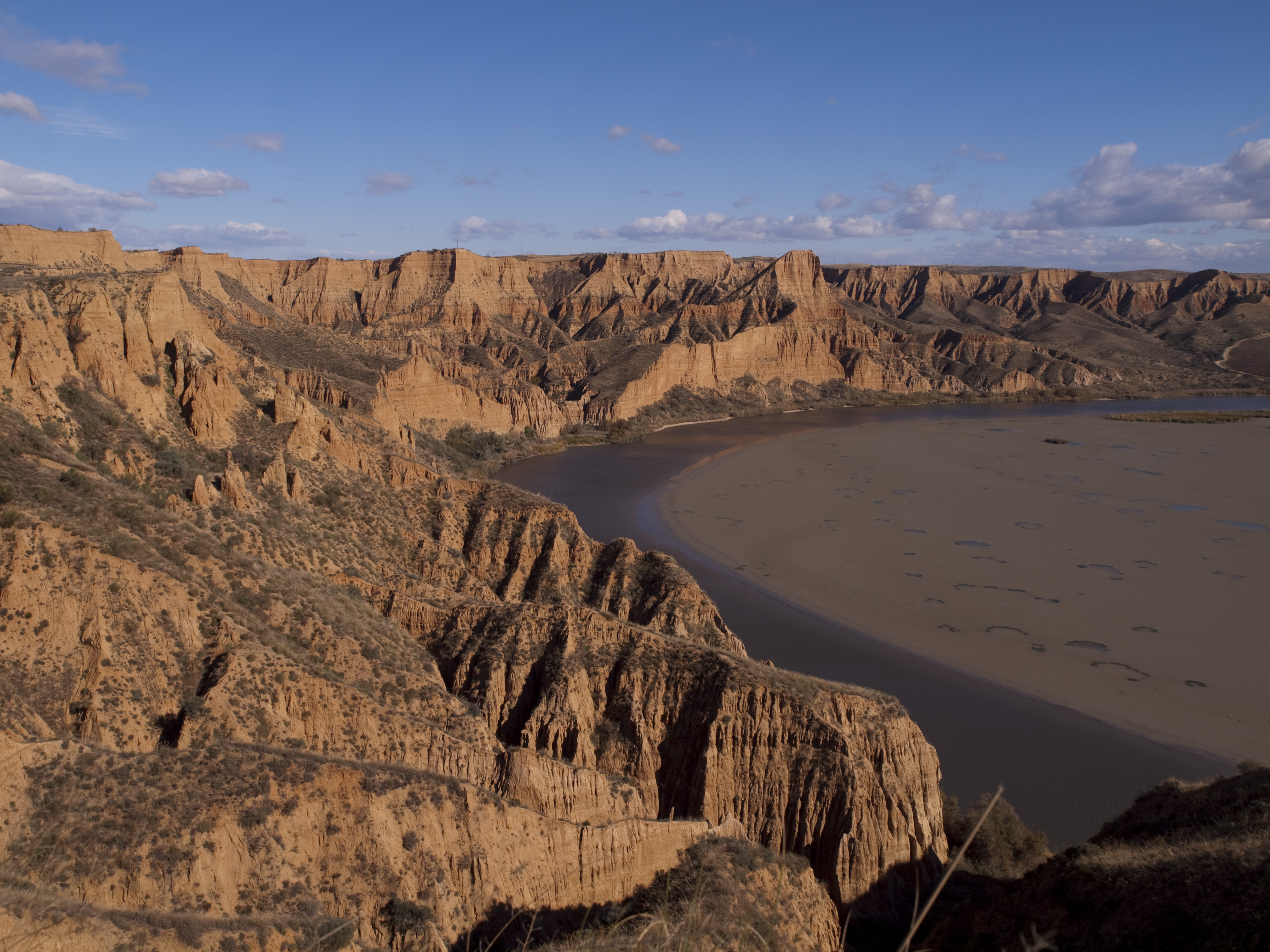 Barrancas de Castrejón, provincia de Toledo, España.